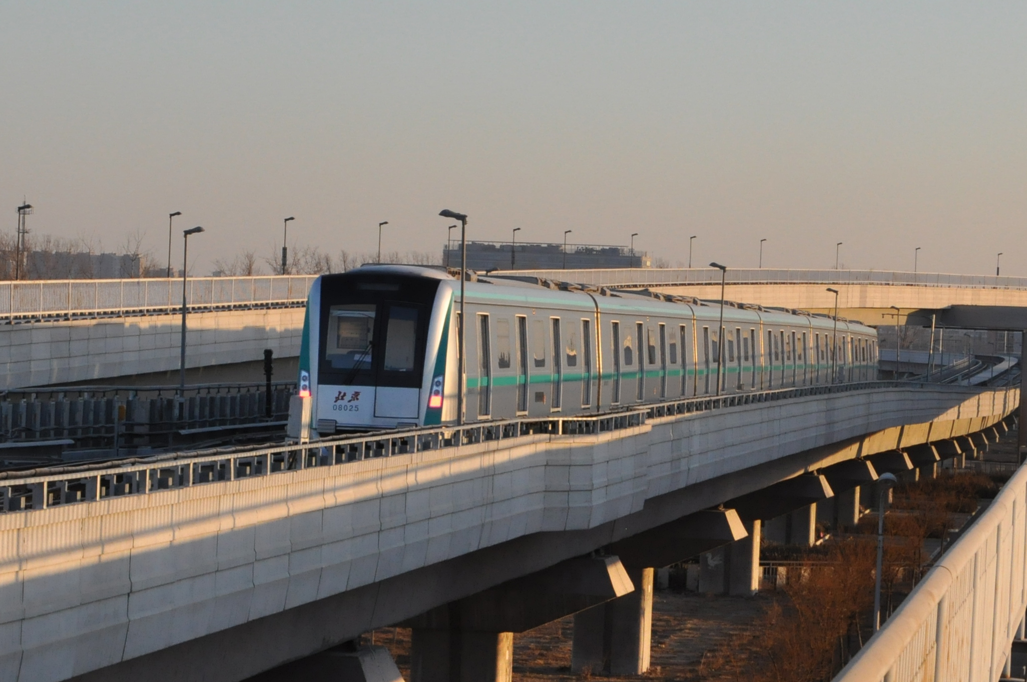 北京地铁8号线列车，摄于朱辛庄站。有裁剪。